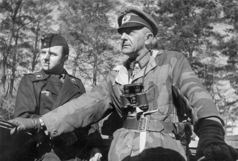 Scherl Bilderdienst Schwerterträger Generalleutnant Mauss, Kommandeur einer aus mehreren Divisionen bestehende Kampfgruppe der Festung Gotenhafen auf einer [seiner] täglichen Frontfahrten PK 670, Bildberichter Lt. Finke Information added by Wikimedia users.General Mauss bleibt trotz einer Amputation des linken Oberschenkels am 25. März 1945 bei der Truppe.